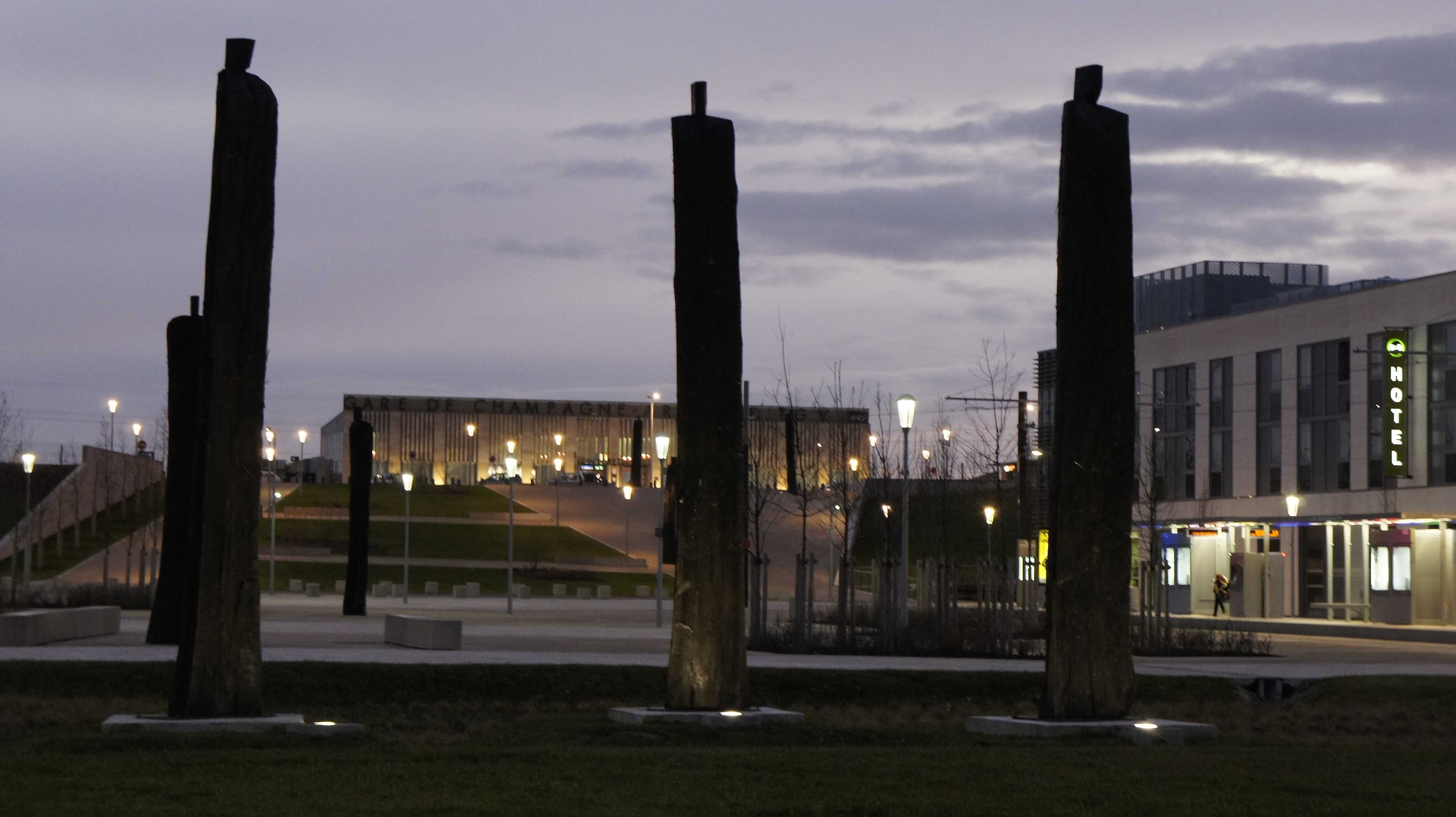 Vue de la gare Champagne TGV et de sa nouvelle esplanade sur laquelle se trouve des sculptures de Christian Lapie "dans l'intervalle".